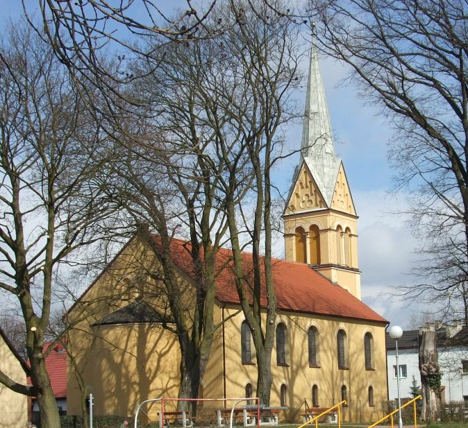 Kościół w Lubrzy